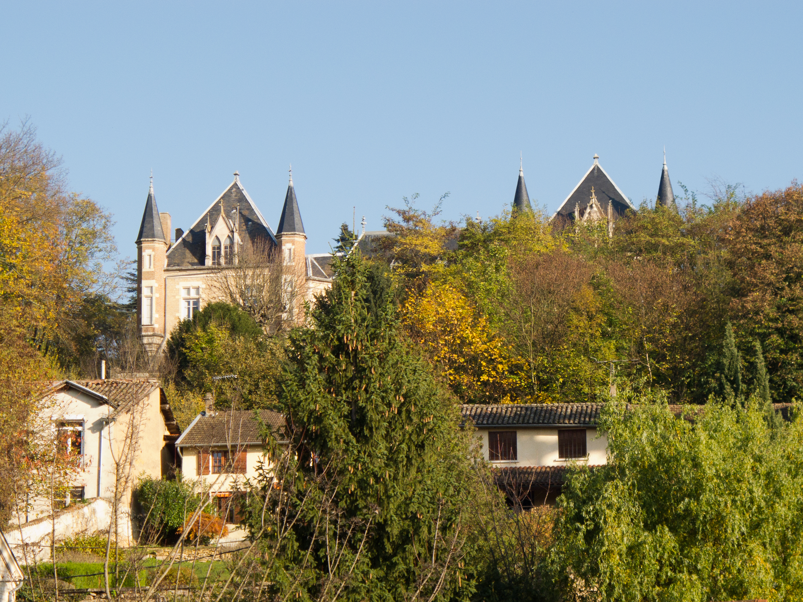 Chateau de Beauregard - Beauregard - Ain - France